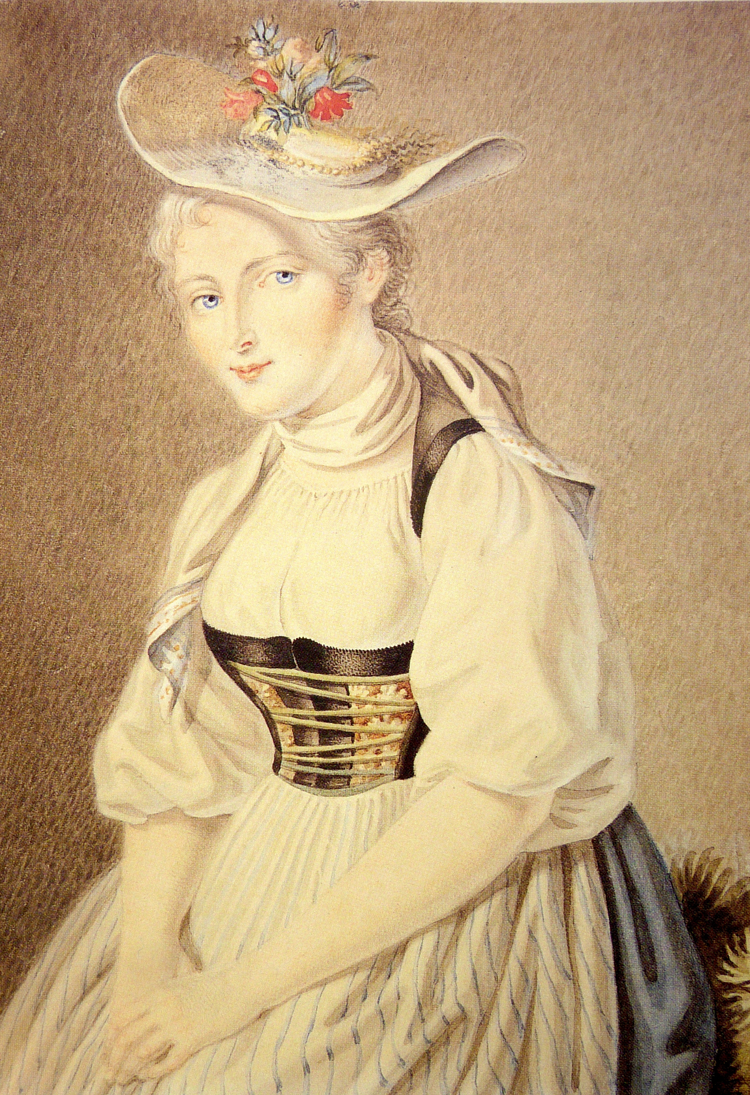 Elisabetha Grossmann um 1811